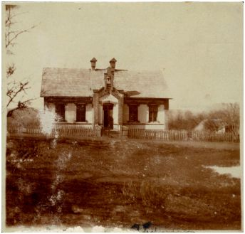 Modlnica:Szkoła Podstawowa przed rozbudową - 1928